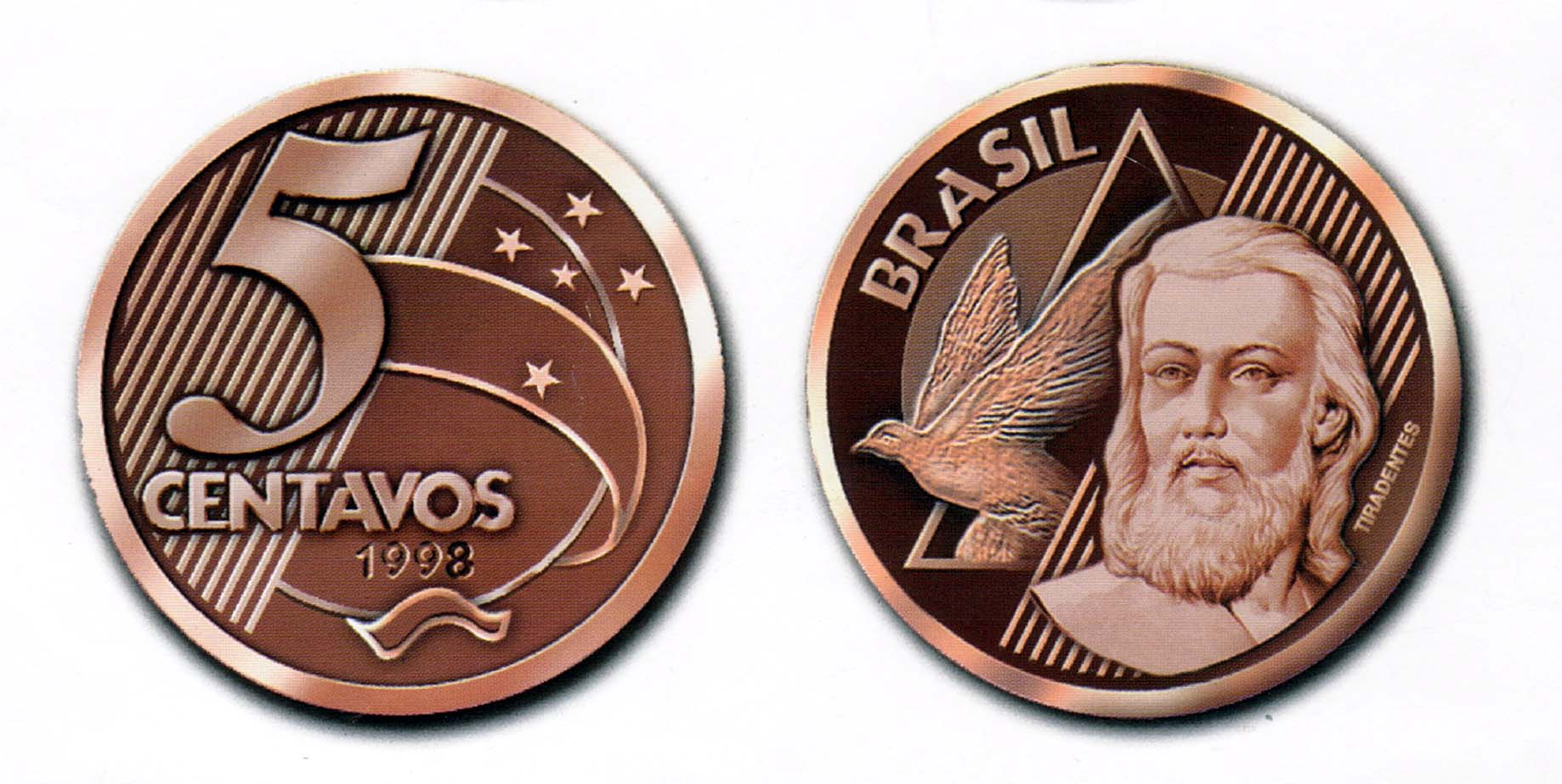 Moeda de 5 centavo(anverso e reverso) da segunda família do Real.